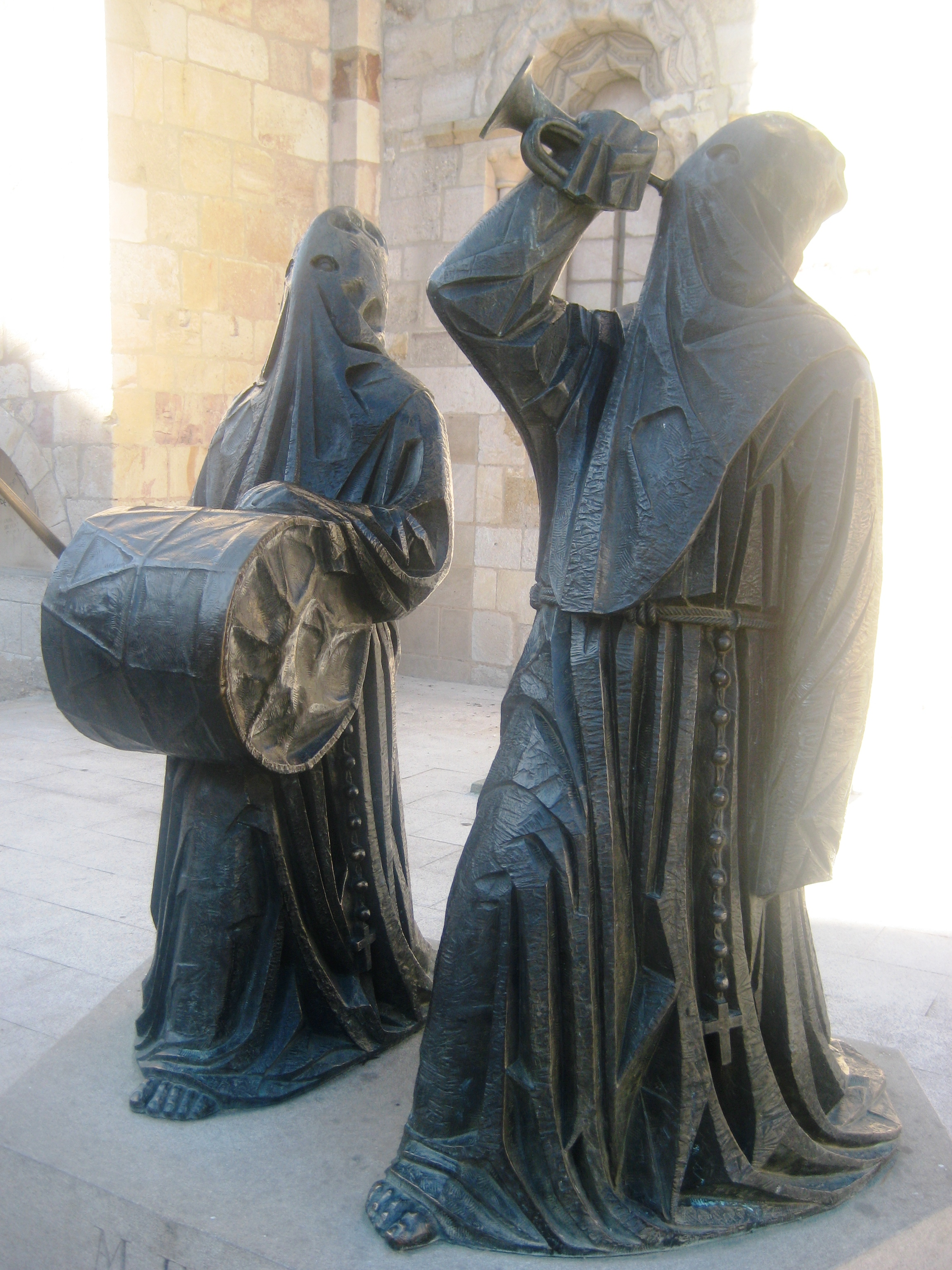 Monumento al Merlú (Zamora), obra del escultor zamorano Antonio Pedrero.